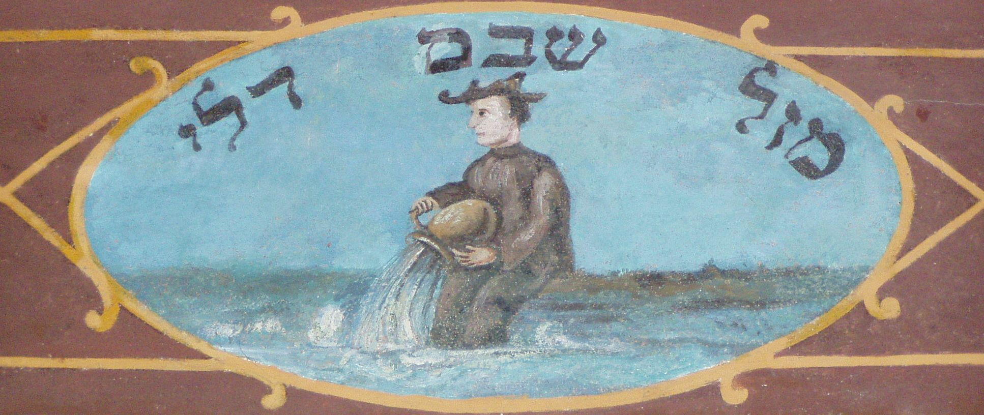 Znaki zodiaku na belkowaniu galerii dla kobiet synagogi Kupa w Krakowie